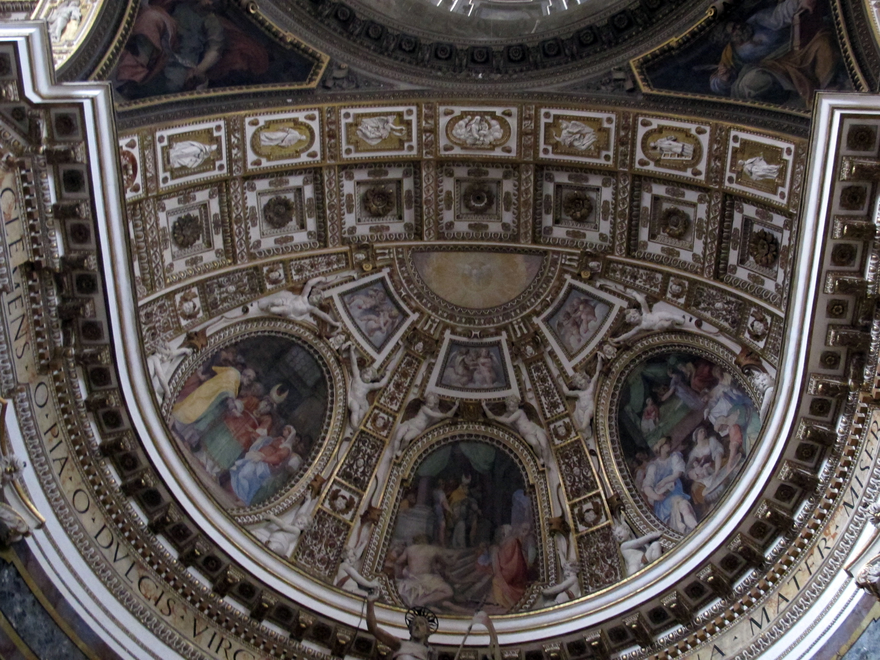 Santa maria ai monti, interno